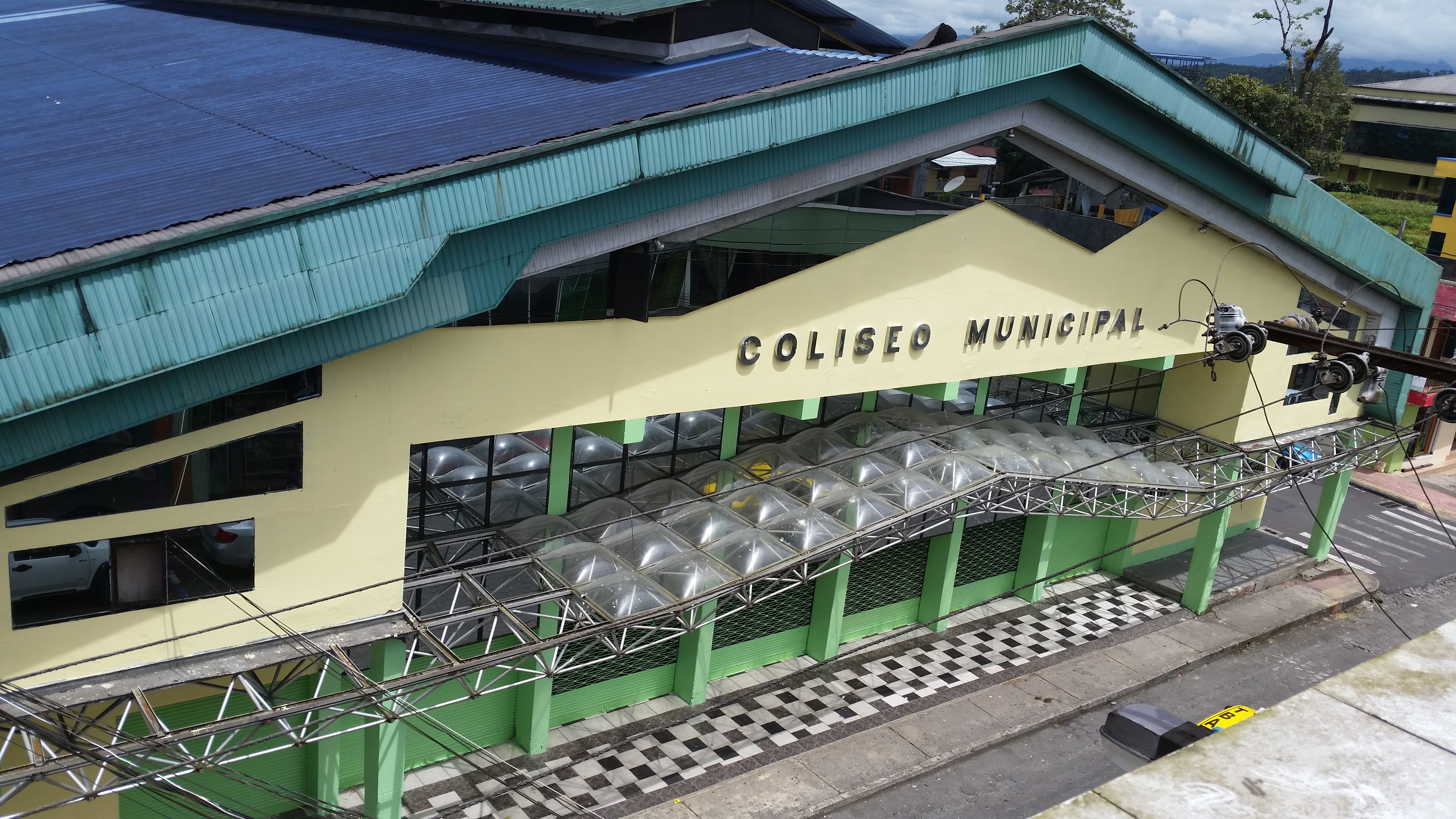 Coliseo Municipal del Cantón Pastaza, Puyo